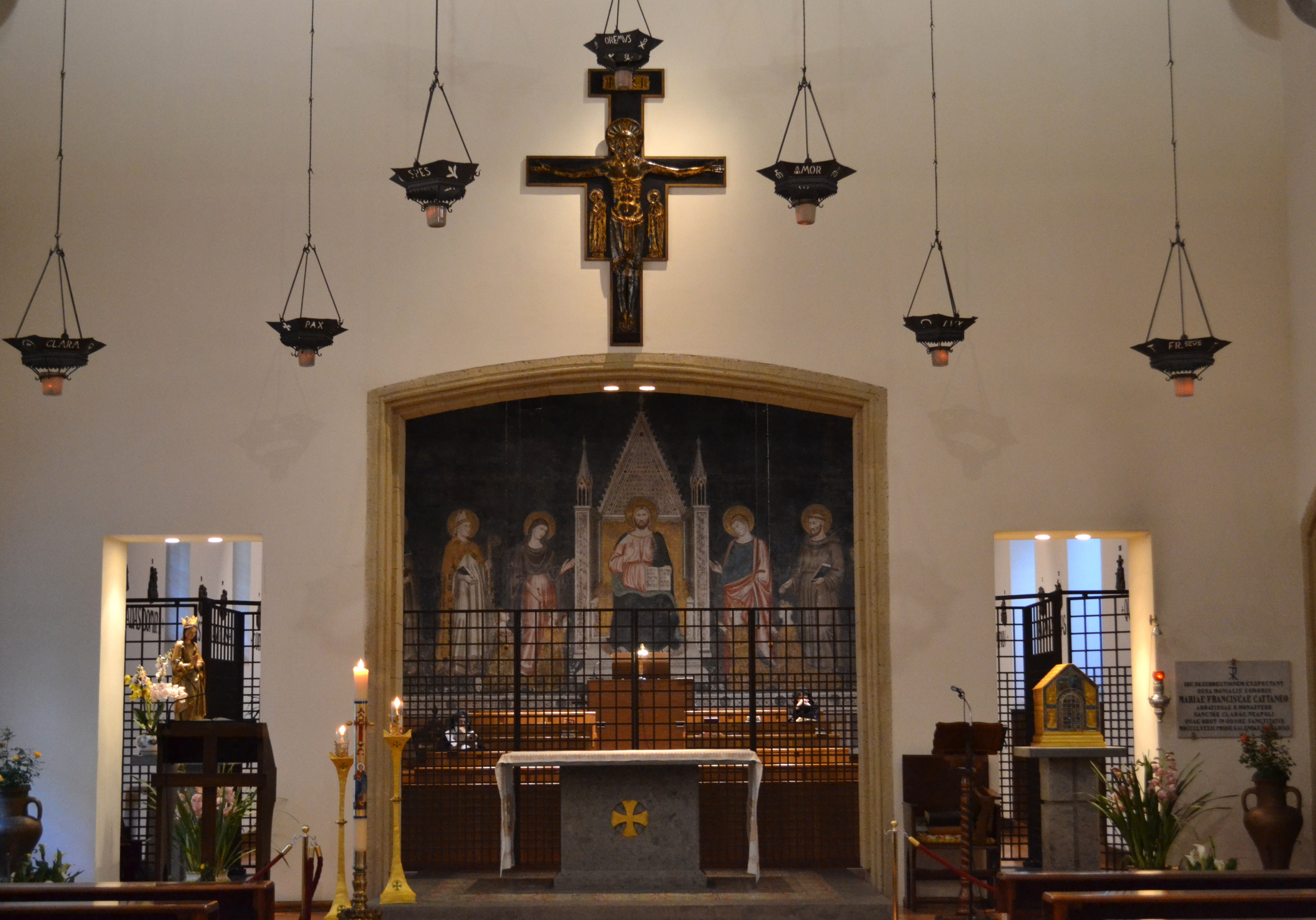 Chiesa delle Clarisse (o di Gesù Redentore e San Ludovico d'Angiò) - Sulla parete frontale affresco di Lello da Orvieto Gesù Redentore tra santi e donatori del 1340 circa.